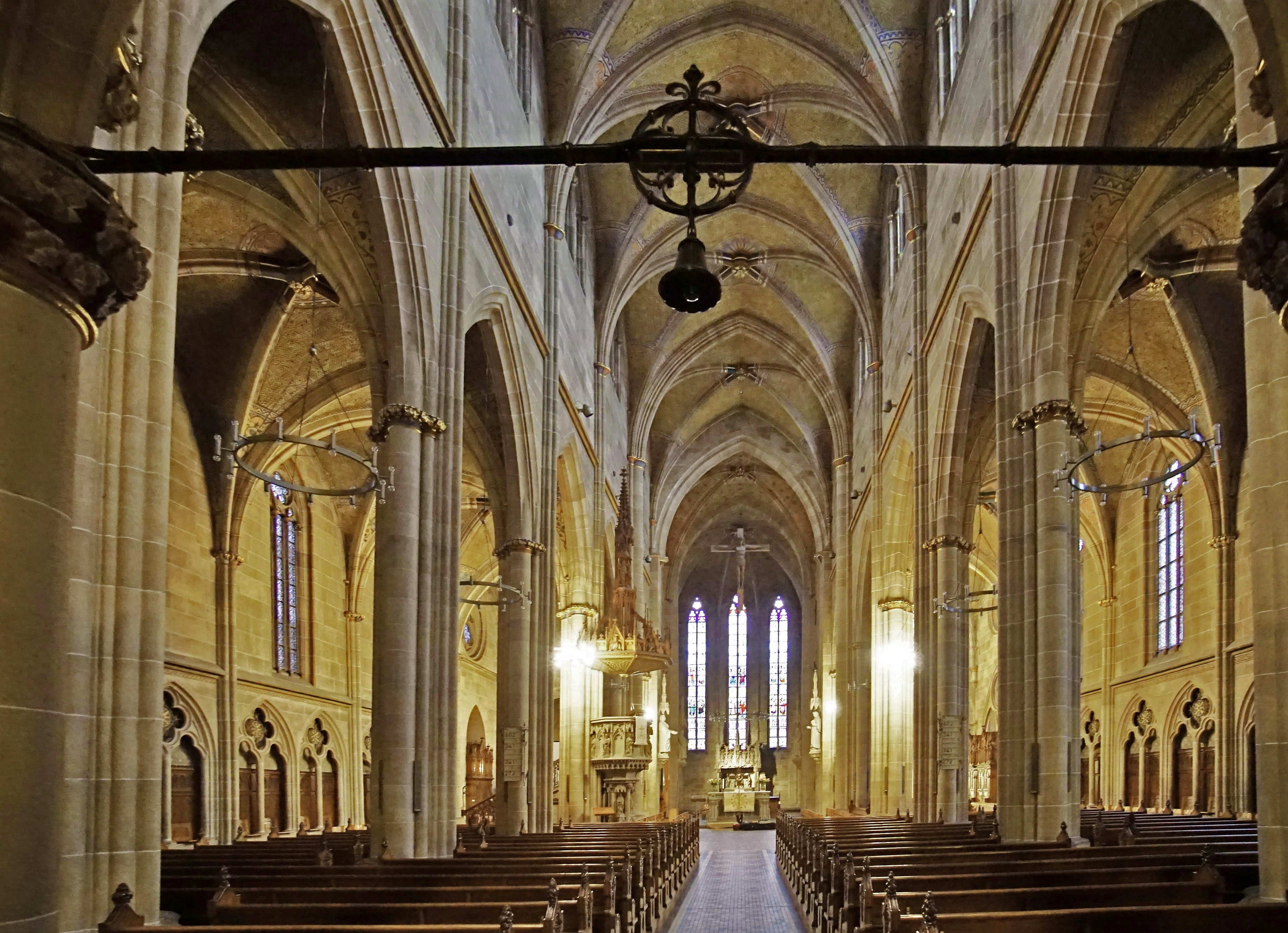 Marienkirche (Reutlingen), Innenansicht